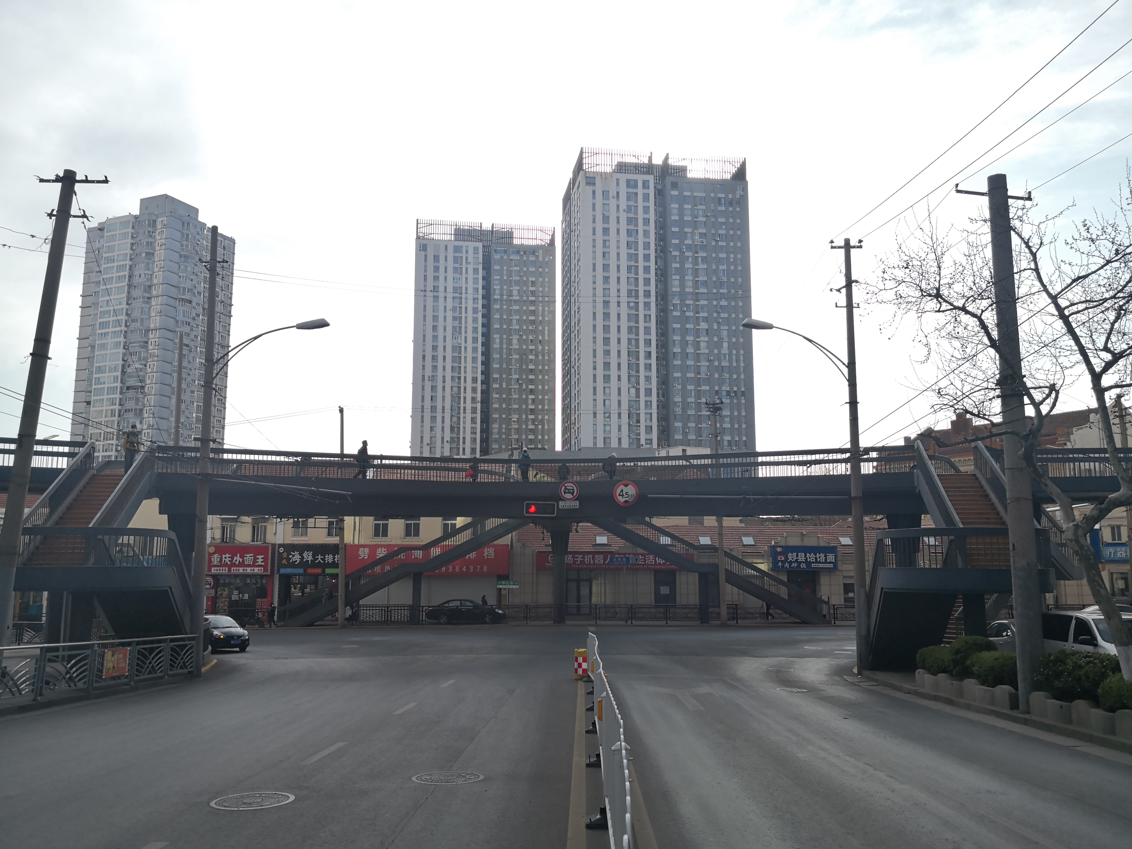 位于青岛市南区中山路与胶州路交叉口的中山路人行天桥